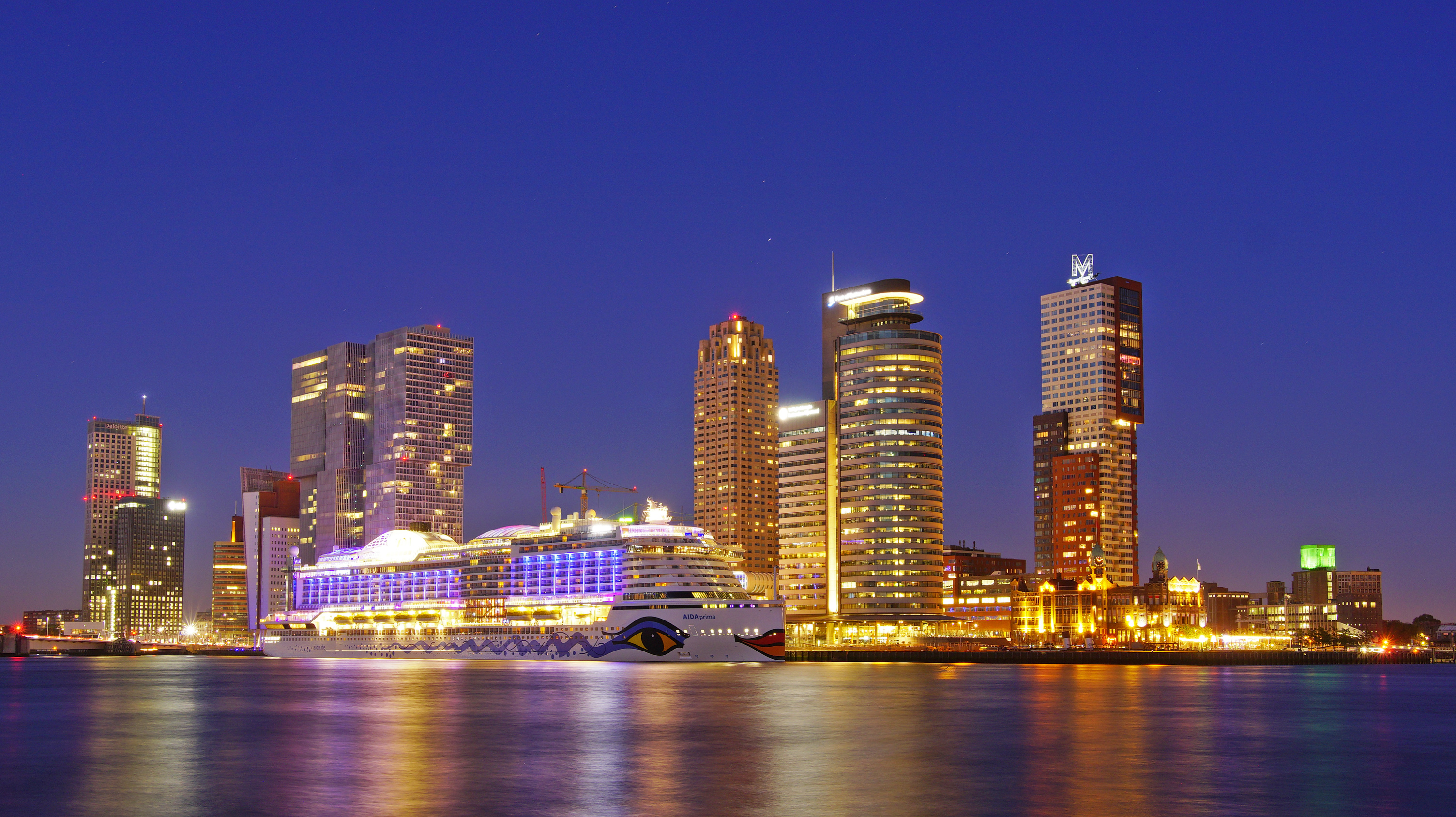 Kop van Zuid Rotterdam